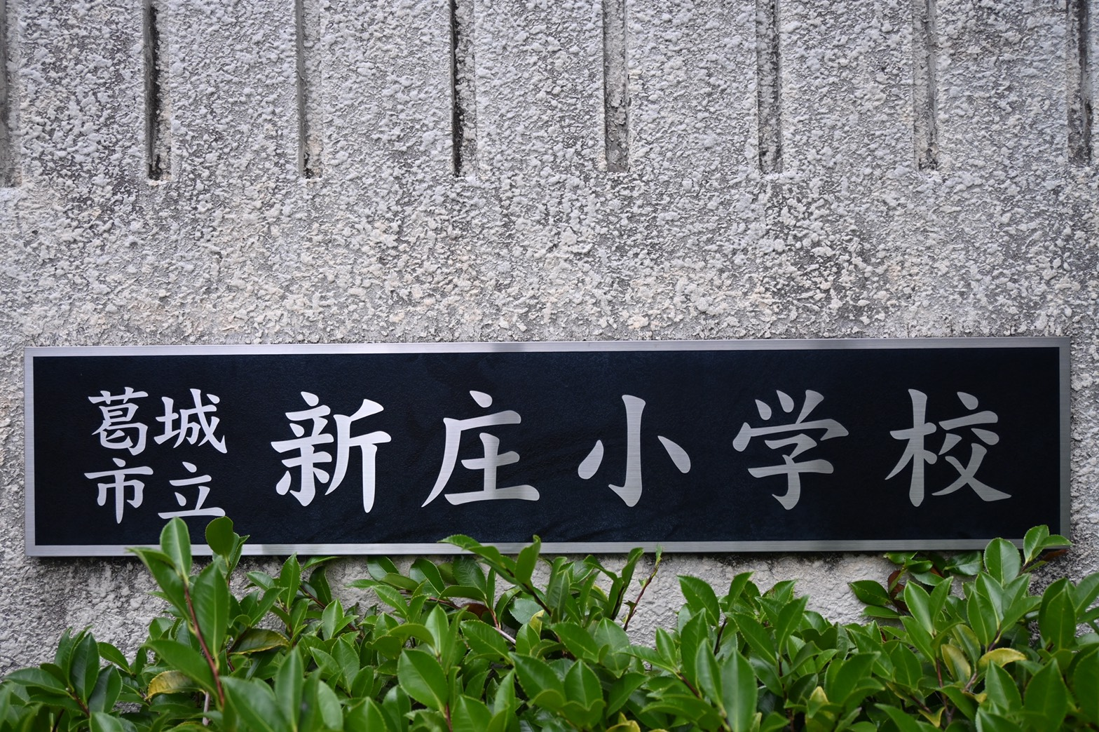 葛城市立新庄小学校の画像